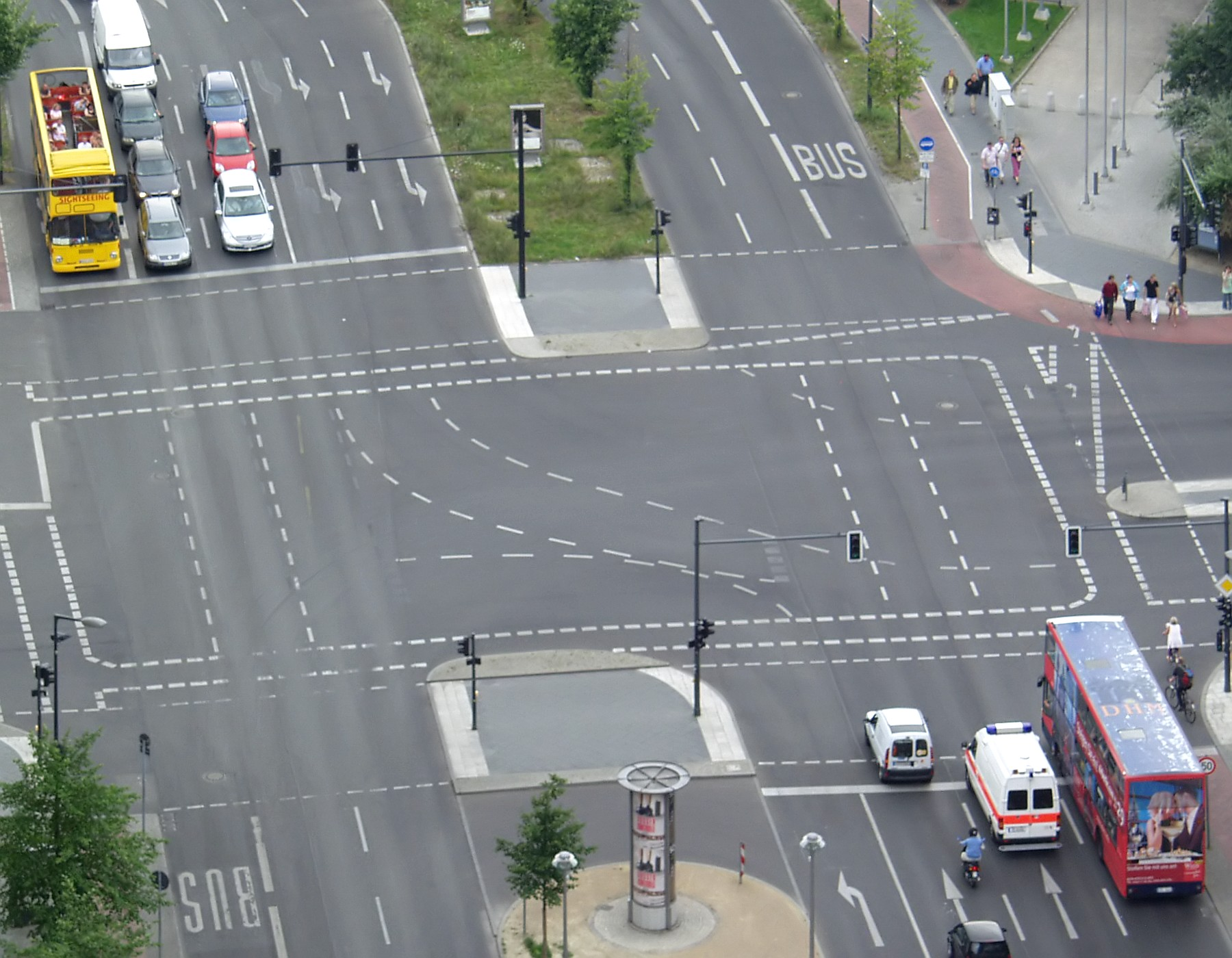 Kreuzung der Bundesstraße 1 (Potsdamer Straße, von oben nach unten) und Bundesstraße 96 (Ben-Gurion-Straße, rechts, s. auch Tiergartentunnel) und Eichhornstraße (links), in Berlin nahe dem Potsdamer Platz von oben